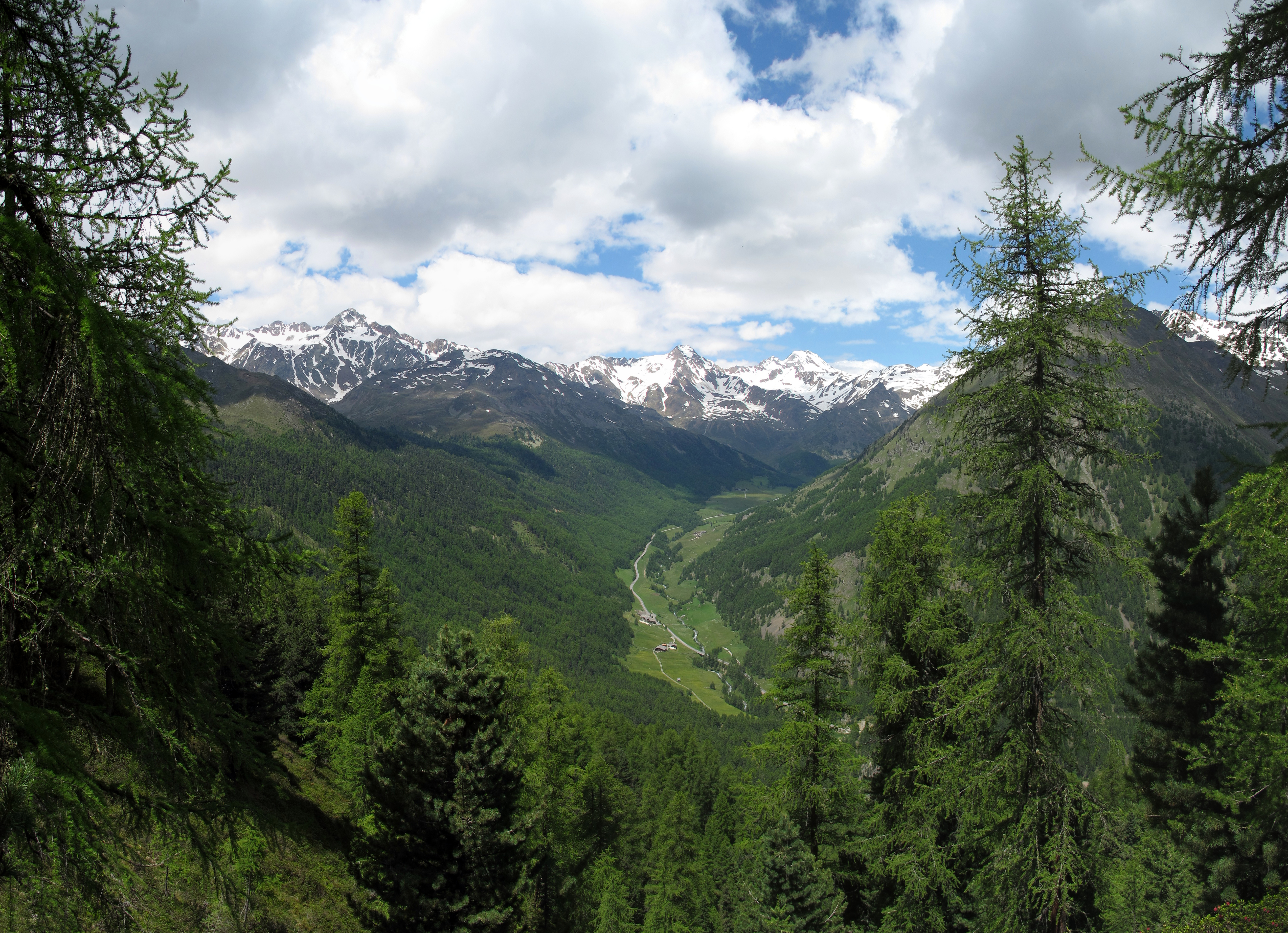 Schnalstal in Südtirol: oberhalb des Stausees, Blick auf Gerstgras